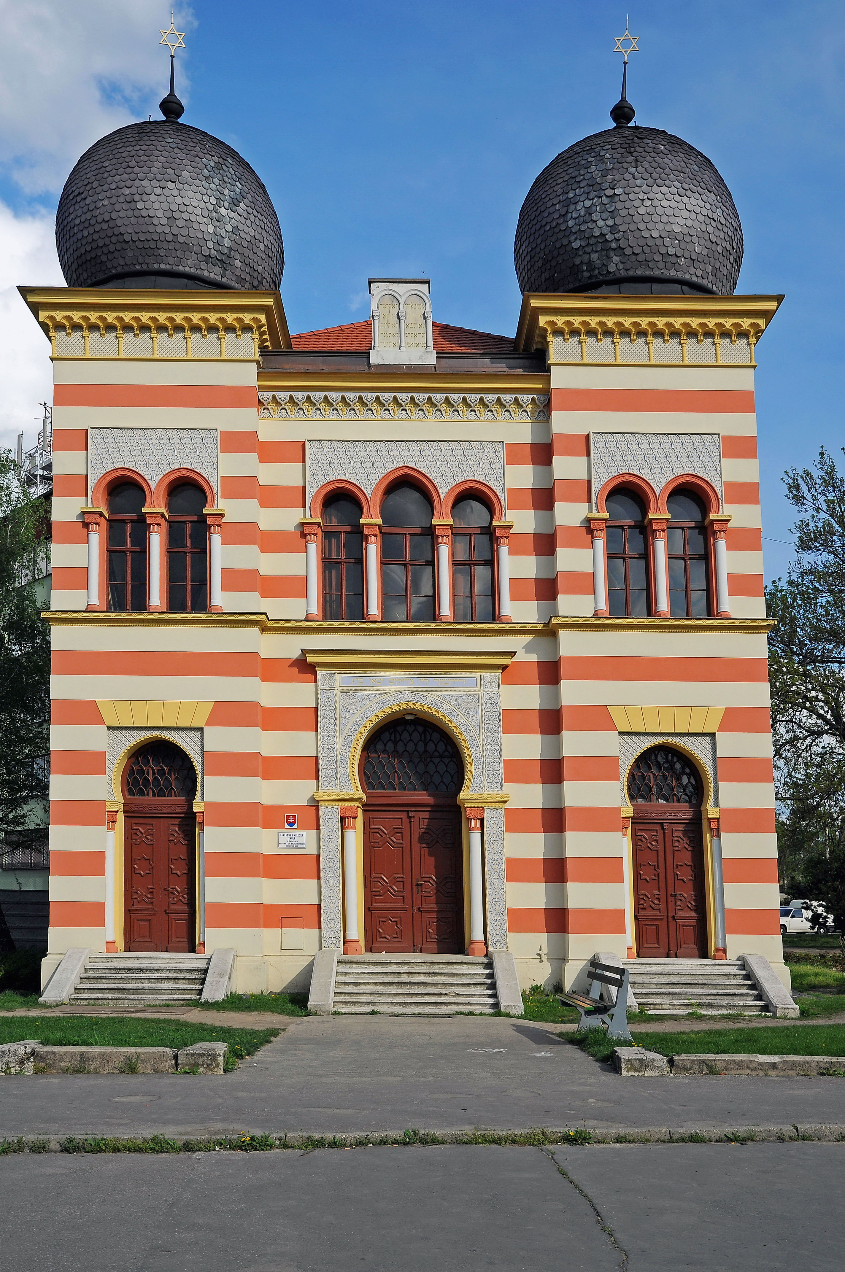 Malacky, synagóga, Slovensko This medium shows the protected monument with the number 106-10733/0 in the Slovak Republic.